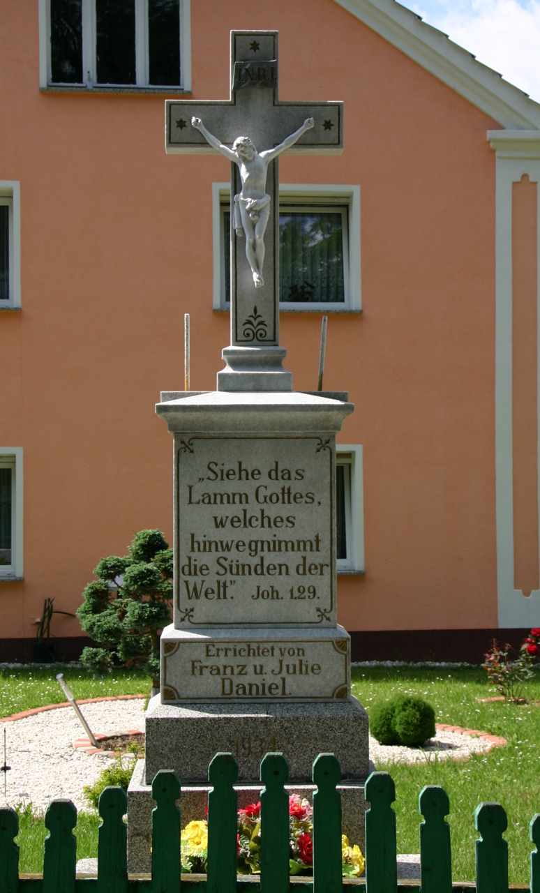 Serwitut (dodatkowa nazwa w j. niem. Servitut) – przysiółek w Polsce położony w województwie opolskim, w powiecie krapkowickim, w gminie Strzeleczki.